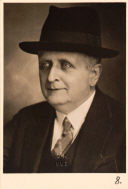 Ladmirault, Paul (1877-1944) -- Portraits